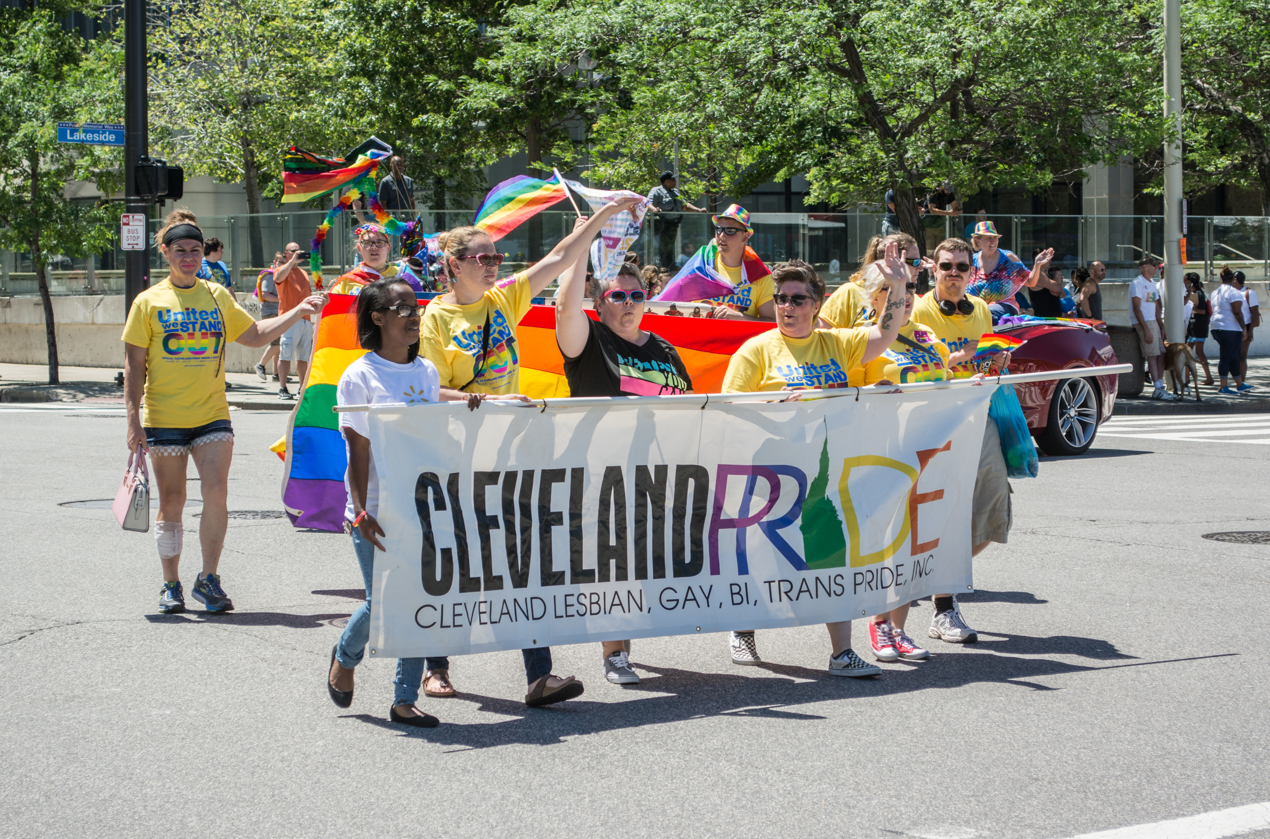 Pride banner - Cleveland Pride 2017